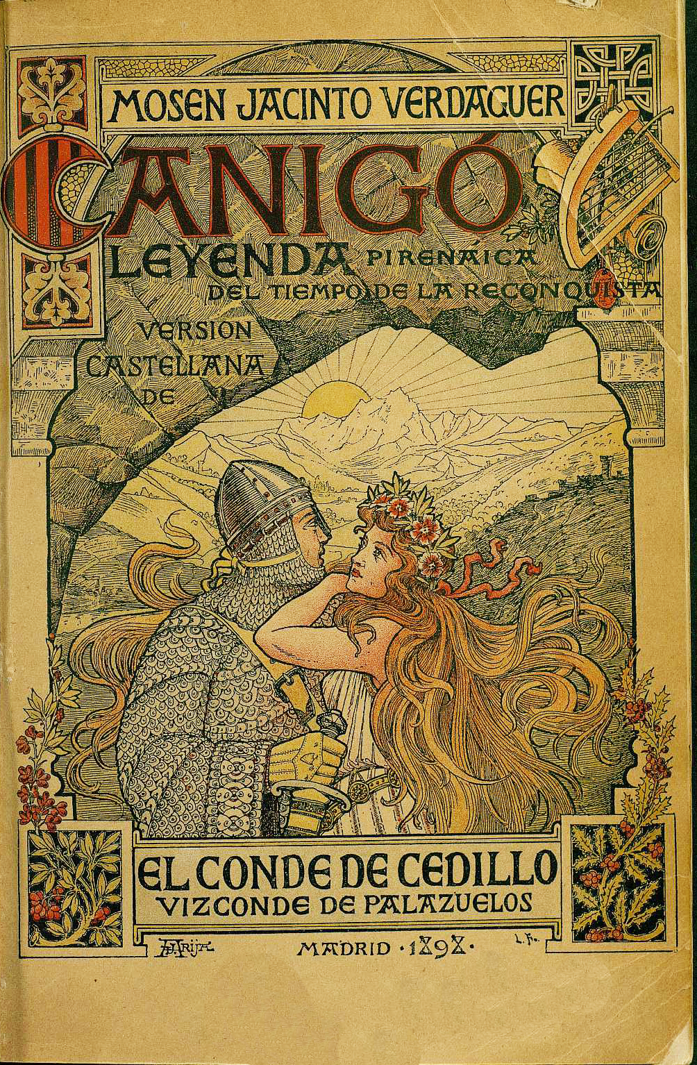 Portada de Canigó, leyenda pirenaica del tiempo de la Reconquista.